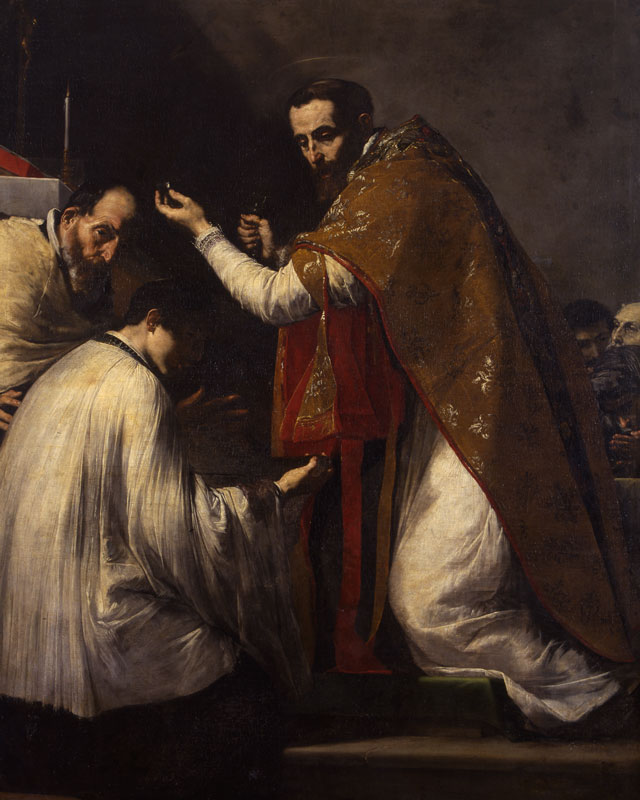 La obra representa al santo Donato de Arezzo († 362) en el momento en que recuperó los pedazos del cáliz que había sido destrozado por unos paganos y que, tras orar sobre los pedazos, se recompuso milagrosamente el cáliz y provocó que los paganos se convirtieran al cristianismo.